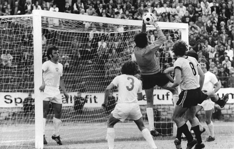 ADN-ZB-Lehmann-14.6.75-str-Berlin: Endspiel um den FDGB-Fußball-Pokal SG Dynamo Dresden - BSG Sachsenring Zwickau- Torwart Jürgen Croy (Zwickau-M.) fängt einen Dresdener Angriff ab. Frank Ganzera (Dresden 4v.l.) und Verteidiger Horst Schykowski (Zwickau-2.v.l.) können nicht mehr eingreifen.